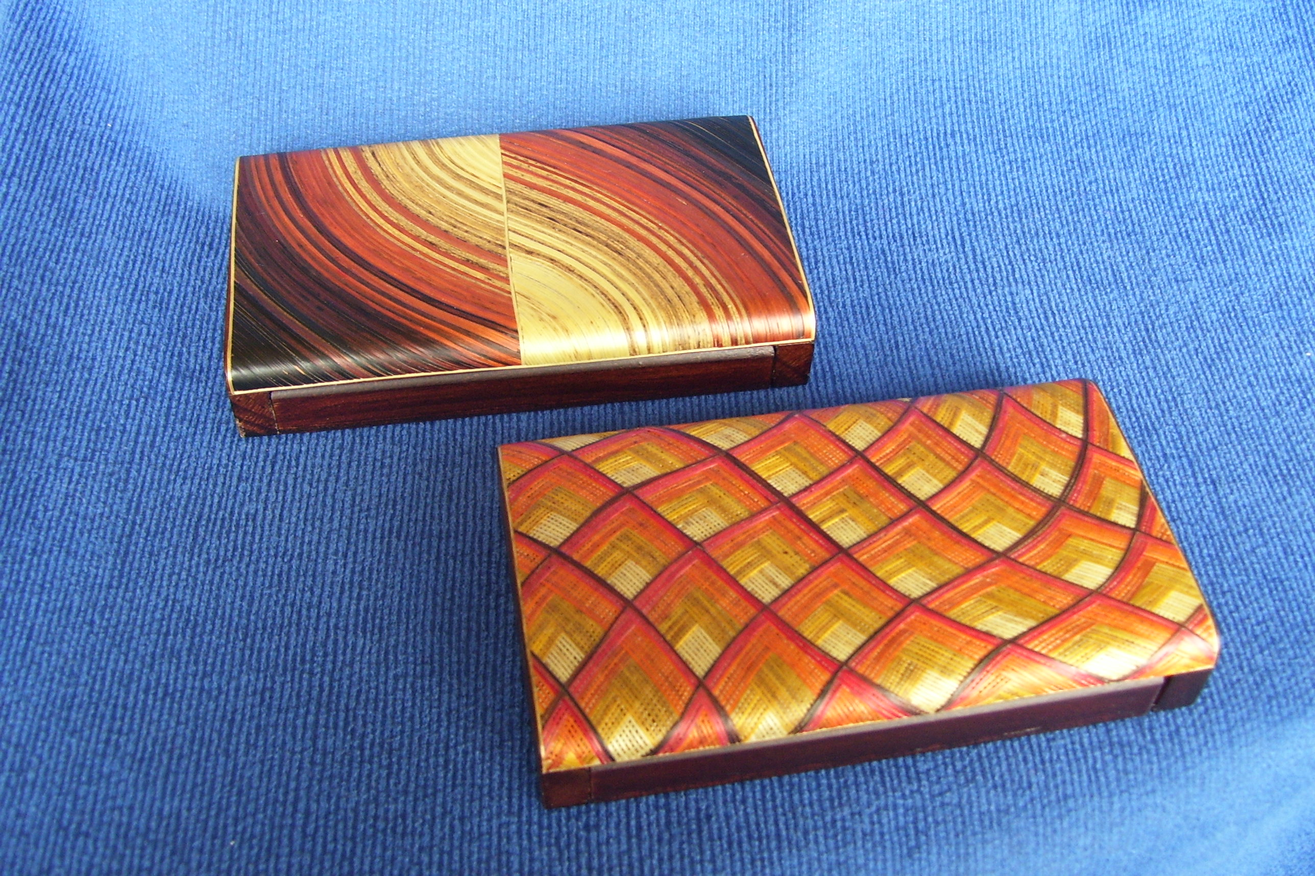 Cajas para tarjetas enchapadas en tamo. Artesano: Diego De La Cruz, San Juan de Pasto, Colombia